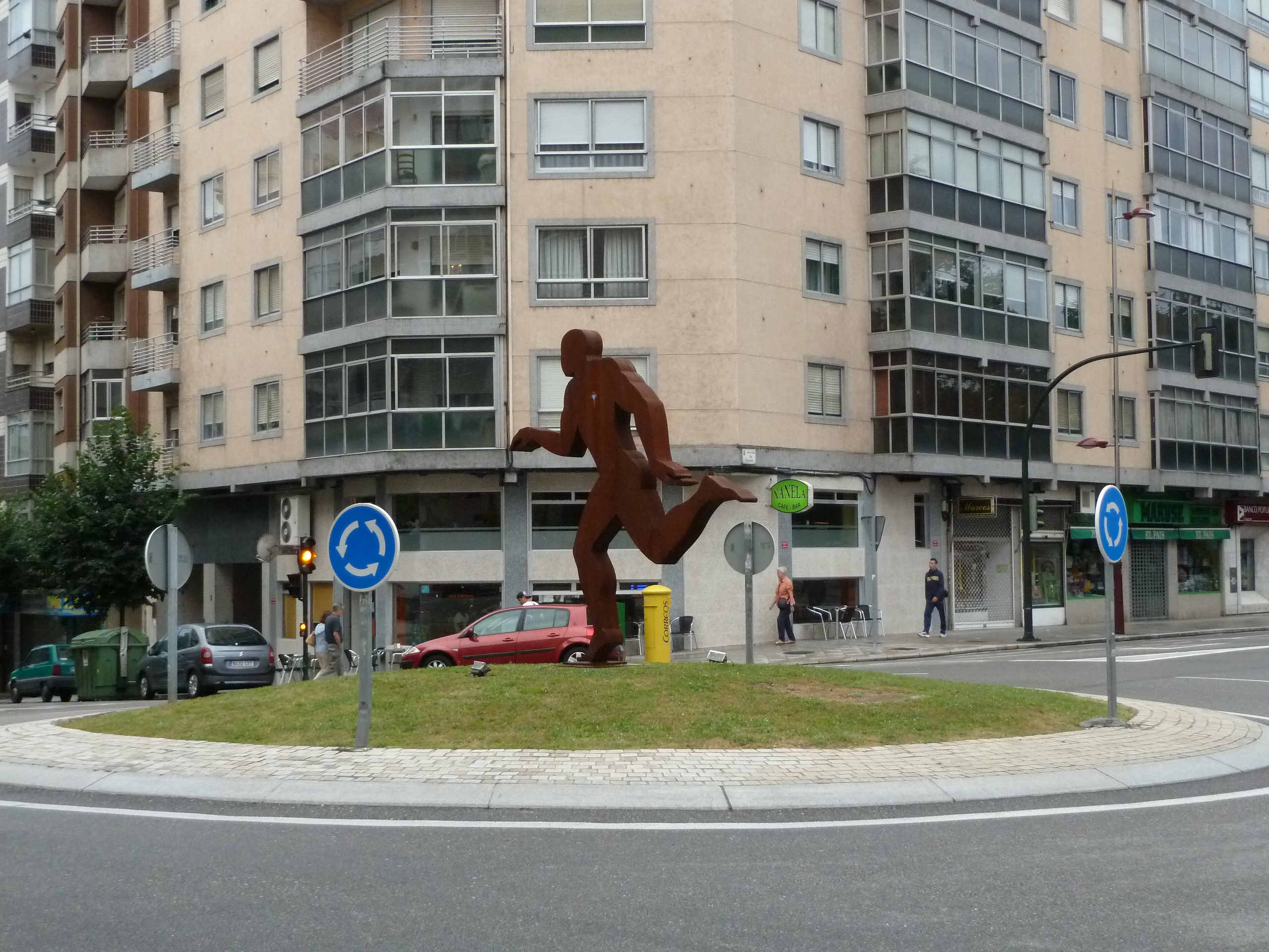 Escultura El corredor, obra de Ramón Conde. Esta escultura atópase na Avenida da Florida de Vigo.